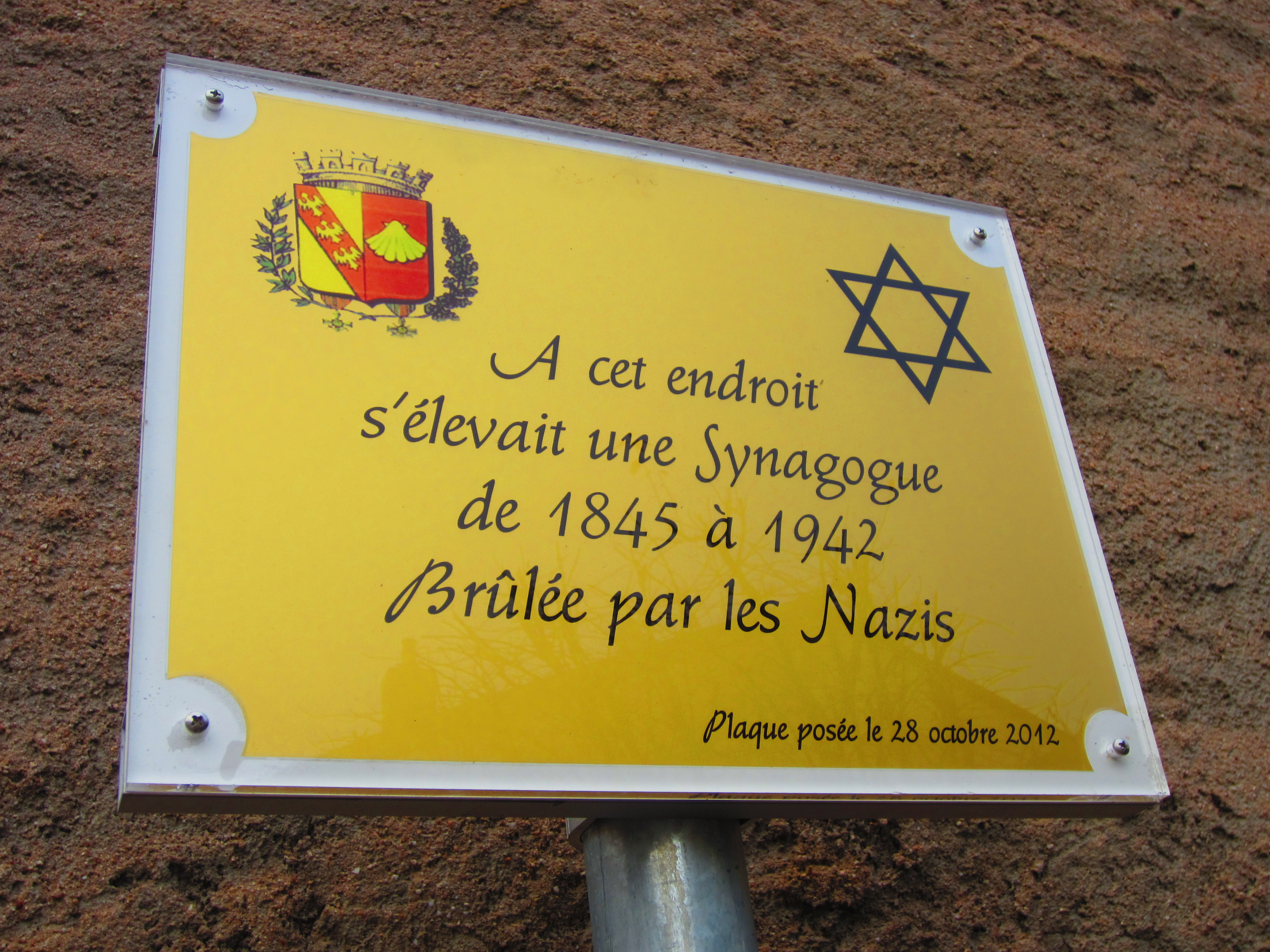 Plaque synagogue Chateau Salins